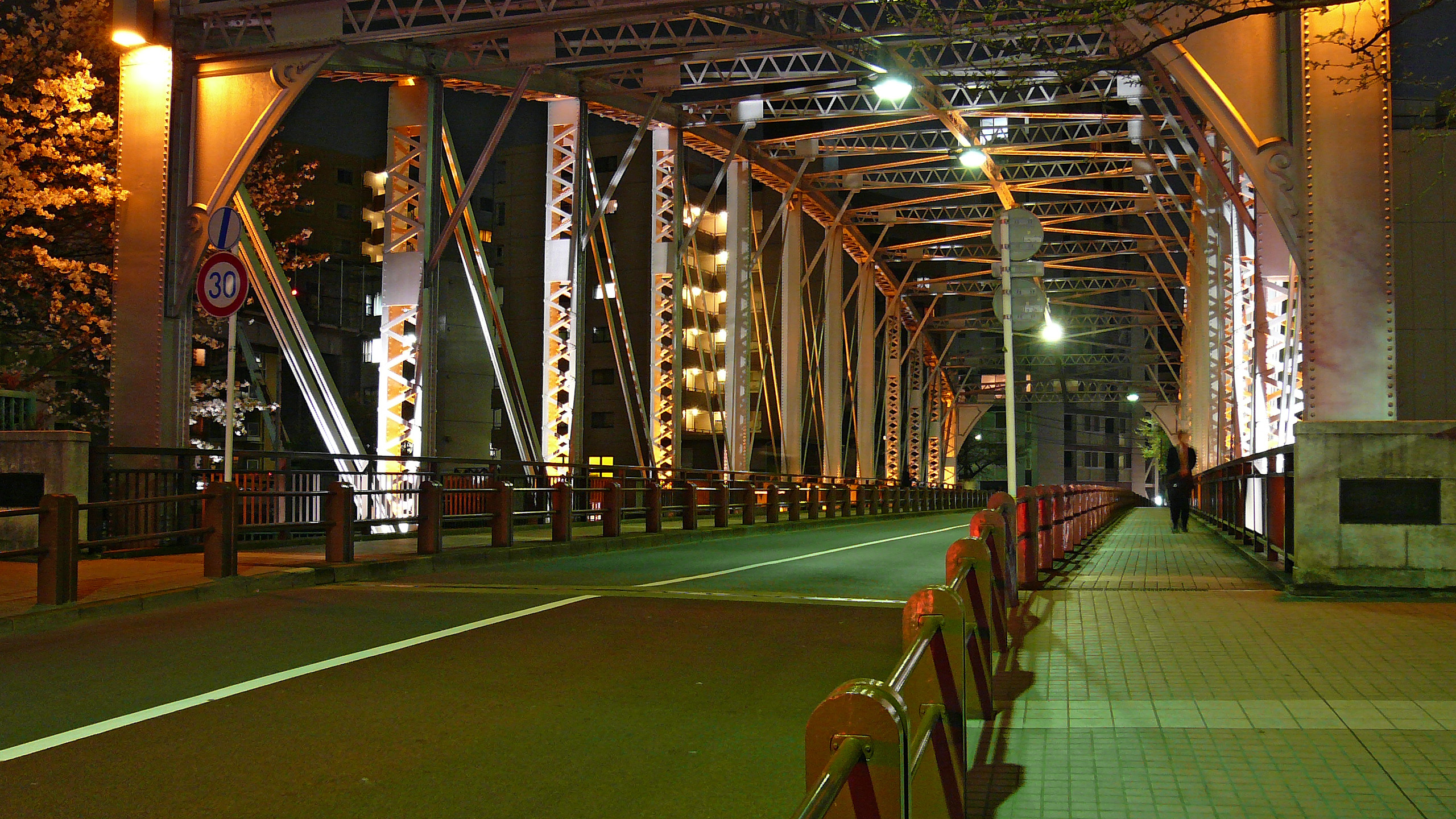 Minamitakabashi in Chuo-ku, Tokyo, Japan